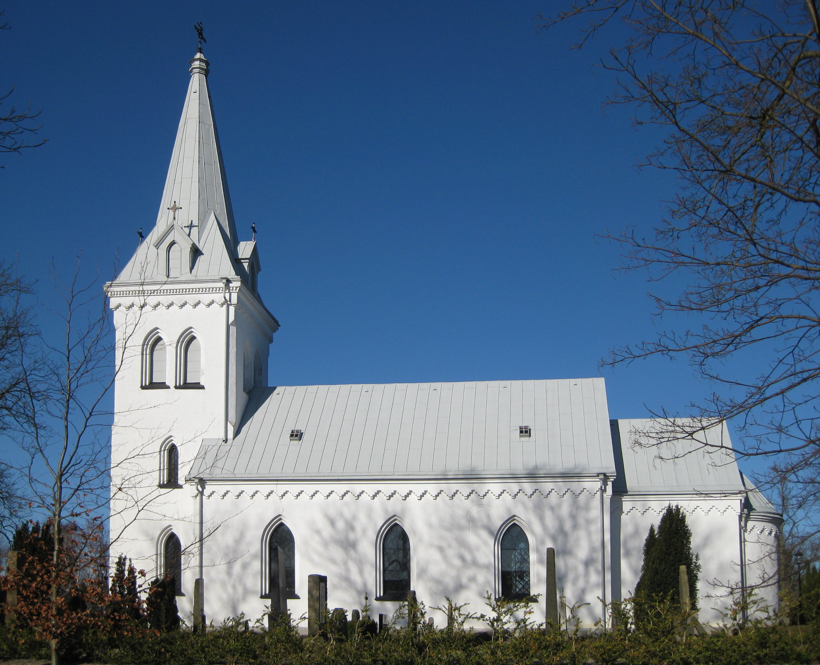 Stångby kyrka i Skåne